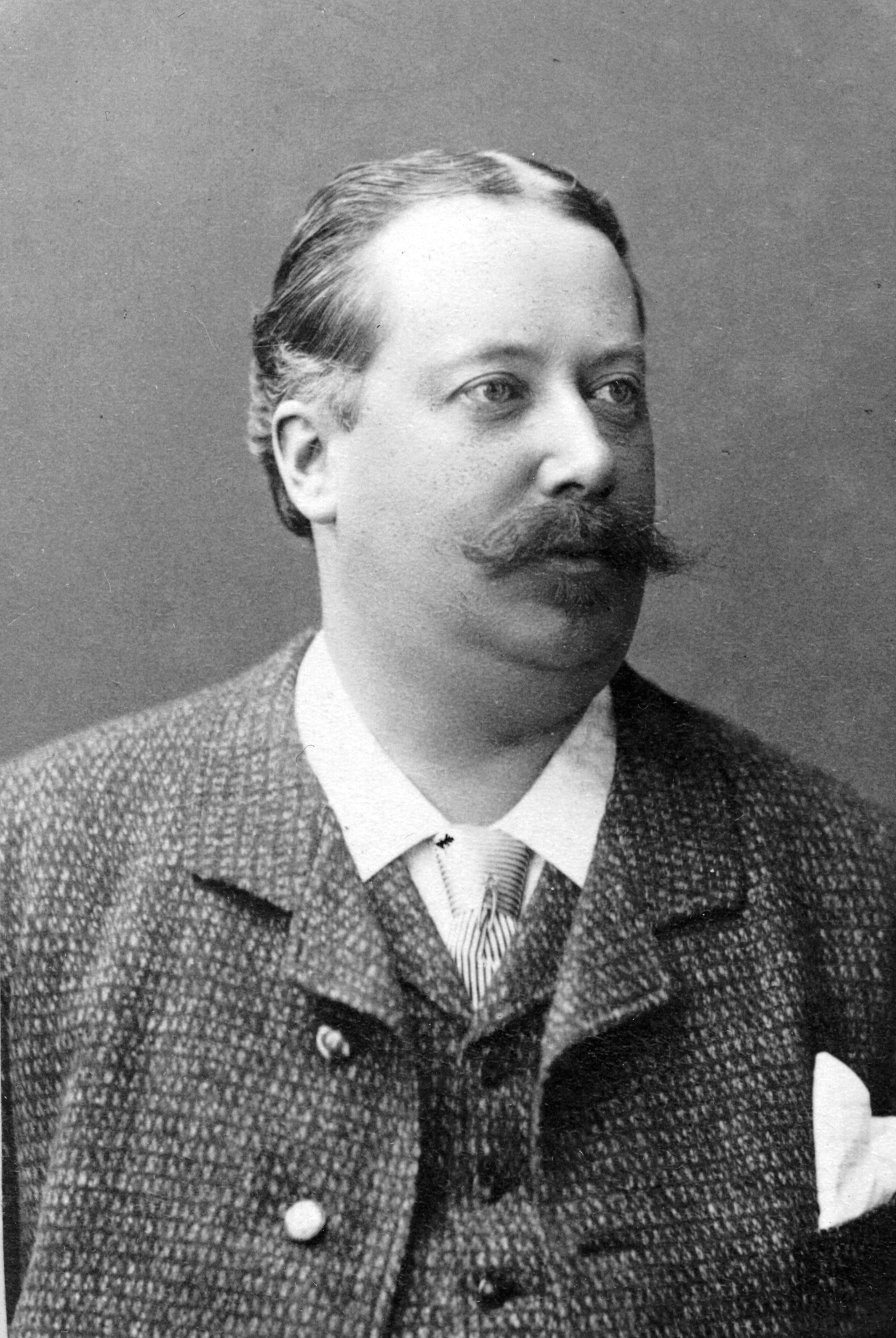 Oscar Bentzon-Gyllich, sångare vid Vasateatern 1886